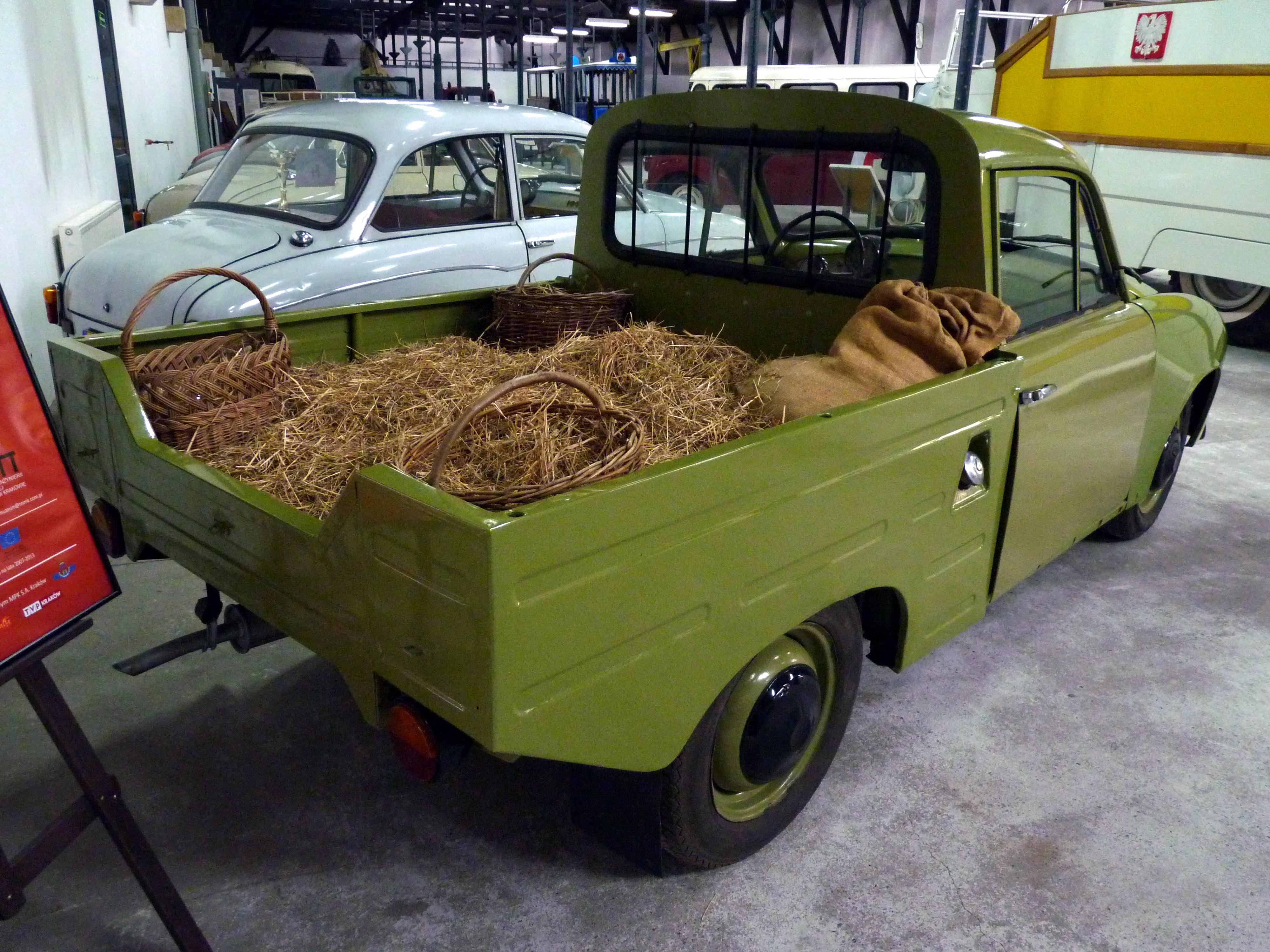 FSM Syrena R-20 in Muzeum Inżynierii Miejskiej in Kraków.